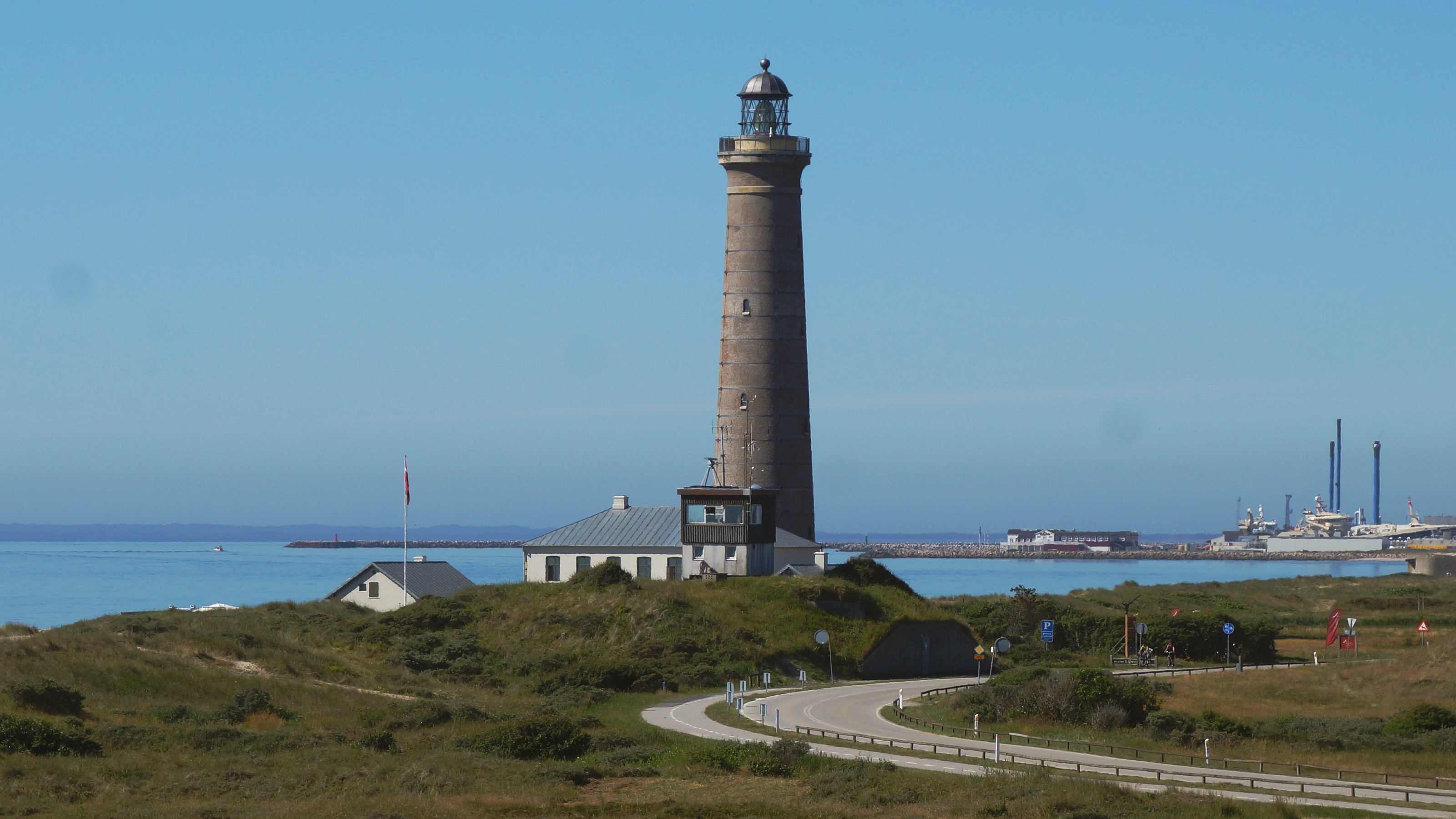 Skagen Fyr: Leuchtturm von 1858 NO-Ansicht. Leuchtfeuer mit 20 sm Tragweite bei einer Turmhöhe 46 m. Turm mit 210 Stufen zur Plattform. Jütland Dänemark Foto Wolfgang Pehlemann DSC01734